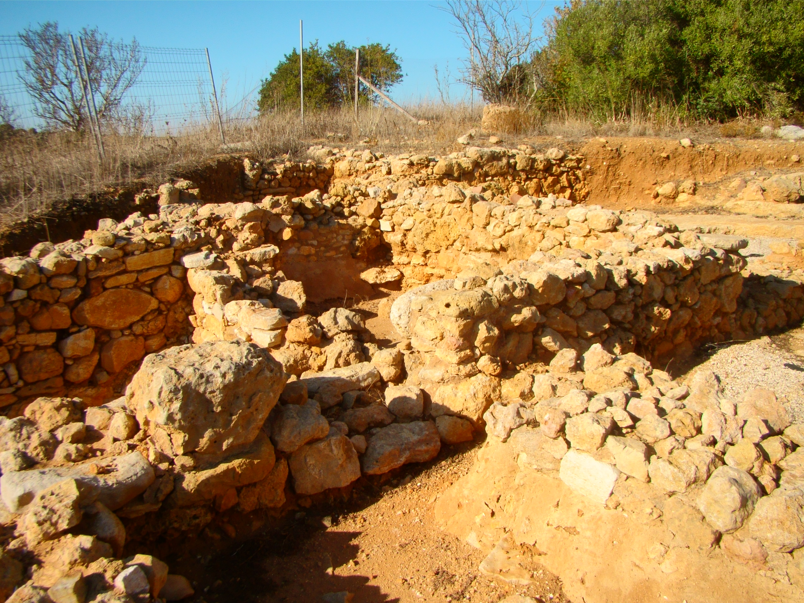 Monte Molião - Compartimentos - 08.11.2017